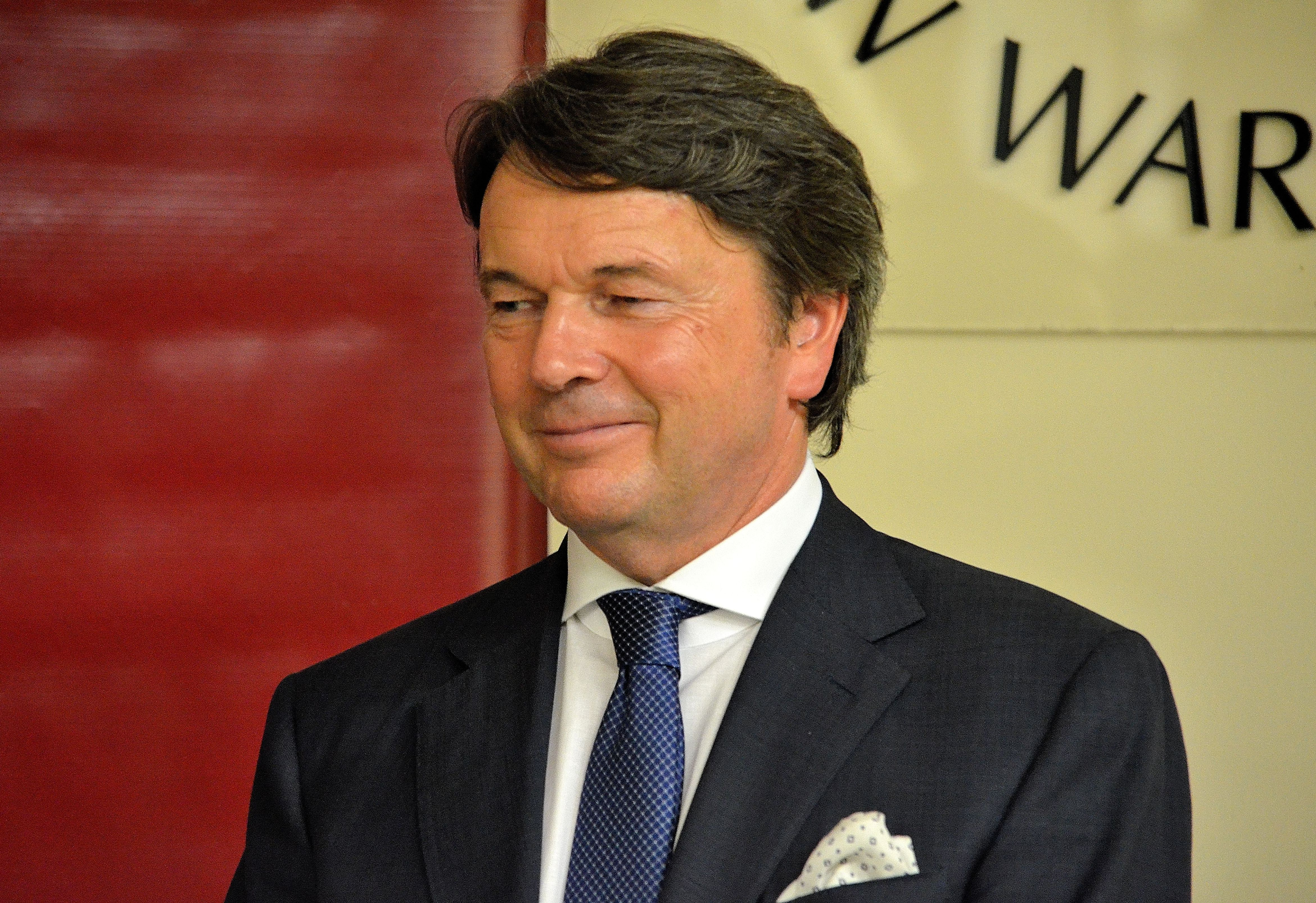 Zbigniew Jakubas po wykładzie "Moja droga w budowaniu i zarządzaniu Grupą Kapitałową Multico - sukcesy i porażki", SGH, 24 października 2012